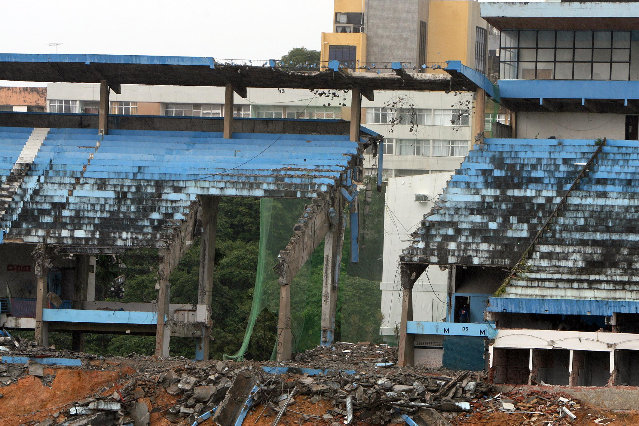 Obras de construção da Arena Fonte Nova Colocação de Rede de Proteção para Implosão. Mais de 90% dos furos onde serão colocados os explosivos já foram feitos. Dos 1.010 furos que precisarão nos pilares para carregamento de explosivos, cerca de 900 já foram executados. Na foto: Construção da Nova Arena Fonte Nova Fotos: Vaner Casaes / AGECOM